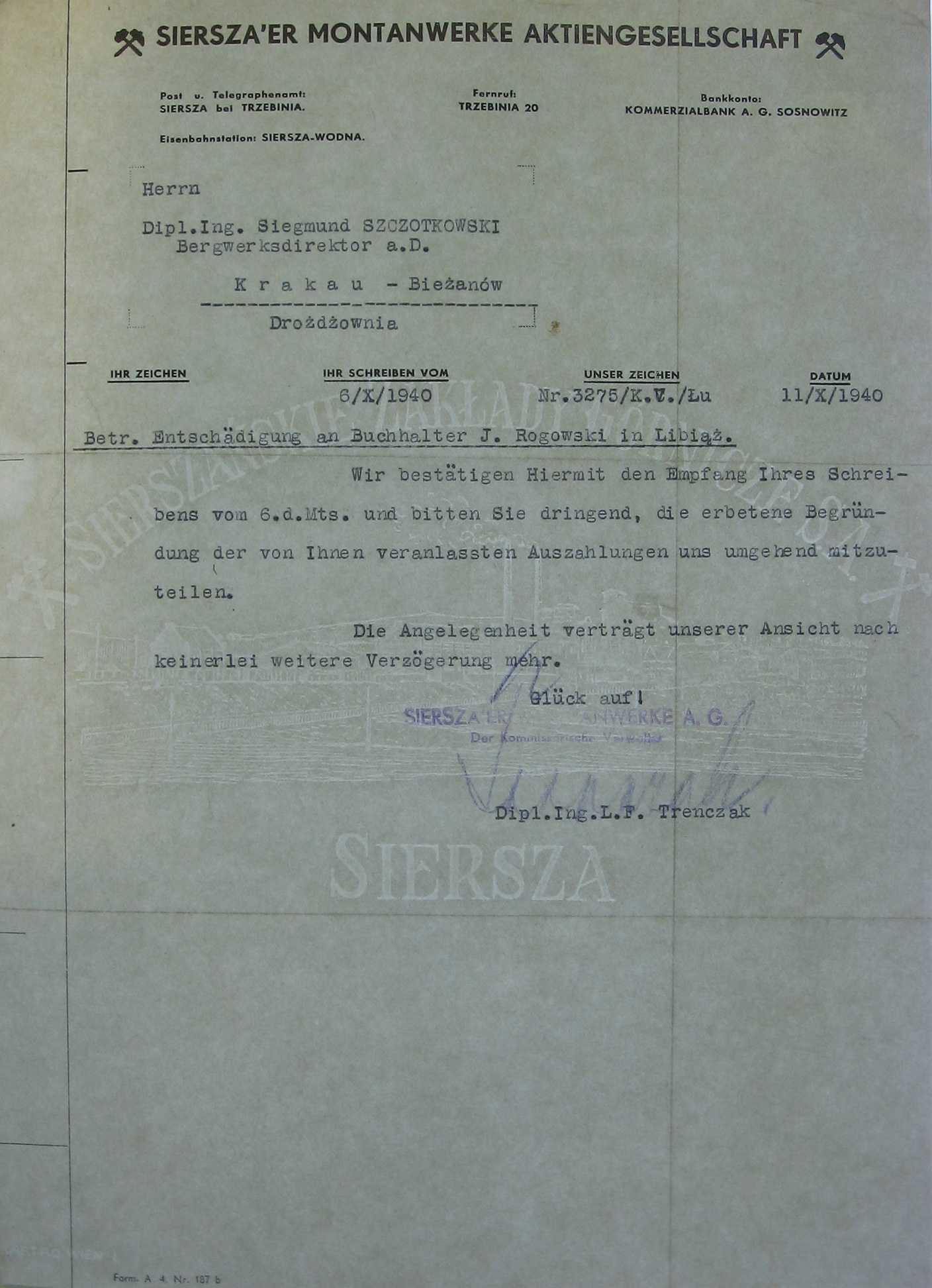 List urzędowy z Sierszańskich Zakładów Górniczych pod okupacją niemiecką, napisany na papierze firmowym ze znakiem wodnym. Zwraca uwagę, że pomimo niemieckiego nadruku Siersza'er Montanwerke Aktiengeselschaft, napis na znaku wodnym pozostał polski i głosi "Sierszańskie Zakłady Górnicze S.A."